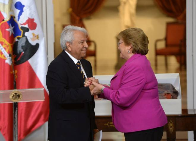 La Presidenta de la República, Michelle Bachelet, acompañada por los ministros de Interior y Seguridad Pública, Mario Fernández; de Obras Públicas, Alberto Undurraga; de Justicia y Derechos Humanos, Jaime Campos; de Energía, Andrés Rebolledo; de la Mujer y la Equidad de Género, Claudia Pascual; de Desarrollo Social, Marcos Barraza; de Minería, Aurora Willimans; de Transporte y Telecomunicaciones; Andrés Gómez-Lobo; y de Cultura, Ernesto Ottone; participó en la ceremonia de entrega al Museo de la Memoria y los Derechos Humanos la bandera rescatada del Palacio de La Moneda después del 11 de septiembre de 1973. Roberto Cuéllar, abogado, ex ministro, ex subsecretario y director del Colegio Terranova, recibió hace algunos meses la bandera de manos de un apoderado del colegio que desea permanecer en el anonimato. Cuéllar asumió la reserva propia del secreto profesional en su calidad de abogado.